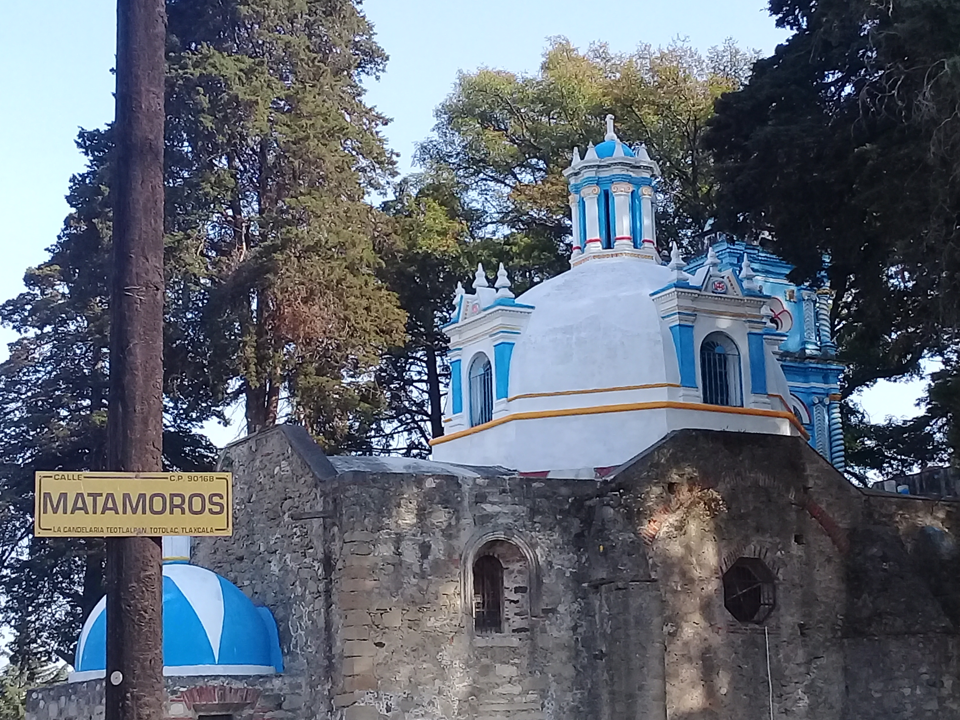 Frontal de la Iglesia de la Candelaria Teotlalpan, Totolac, Tlaxcala